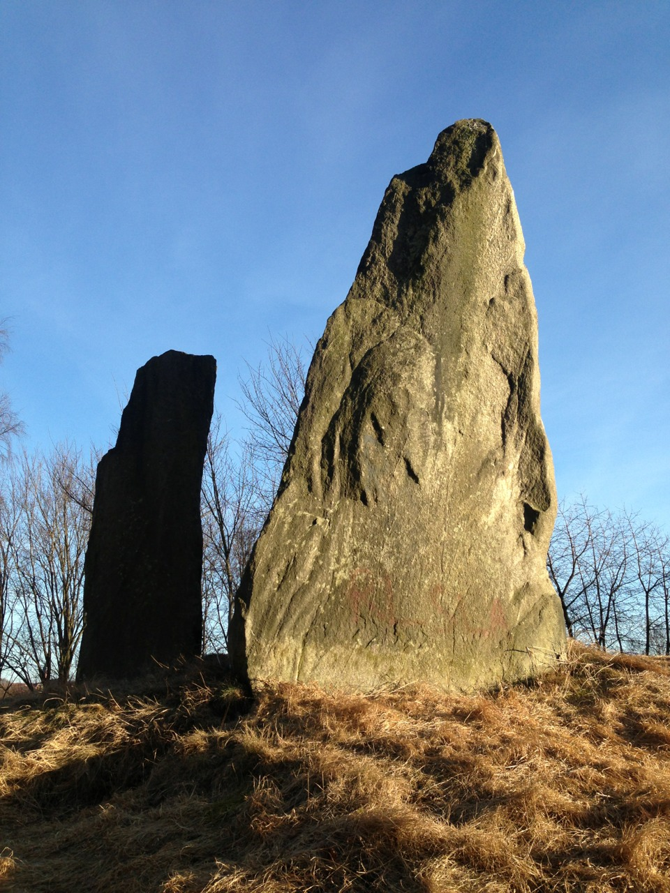 Ett foto på Sannegårdsmonumentet på Hisingen i Göteborg, 2013